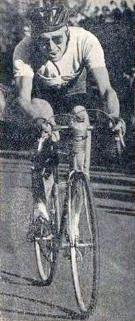 Jacques Dupont, vainqueur de Paris-Tours 1951.